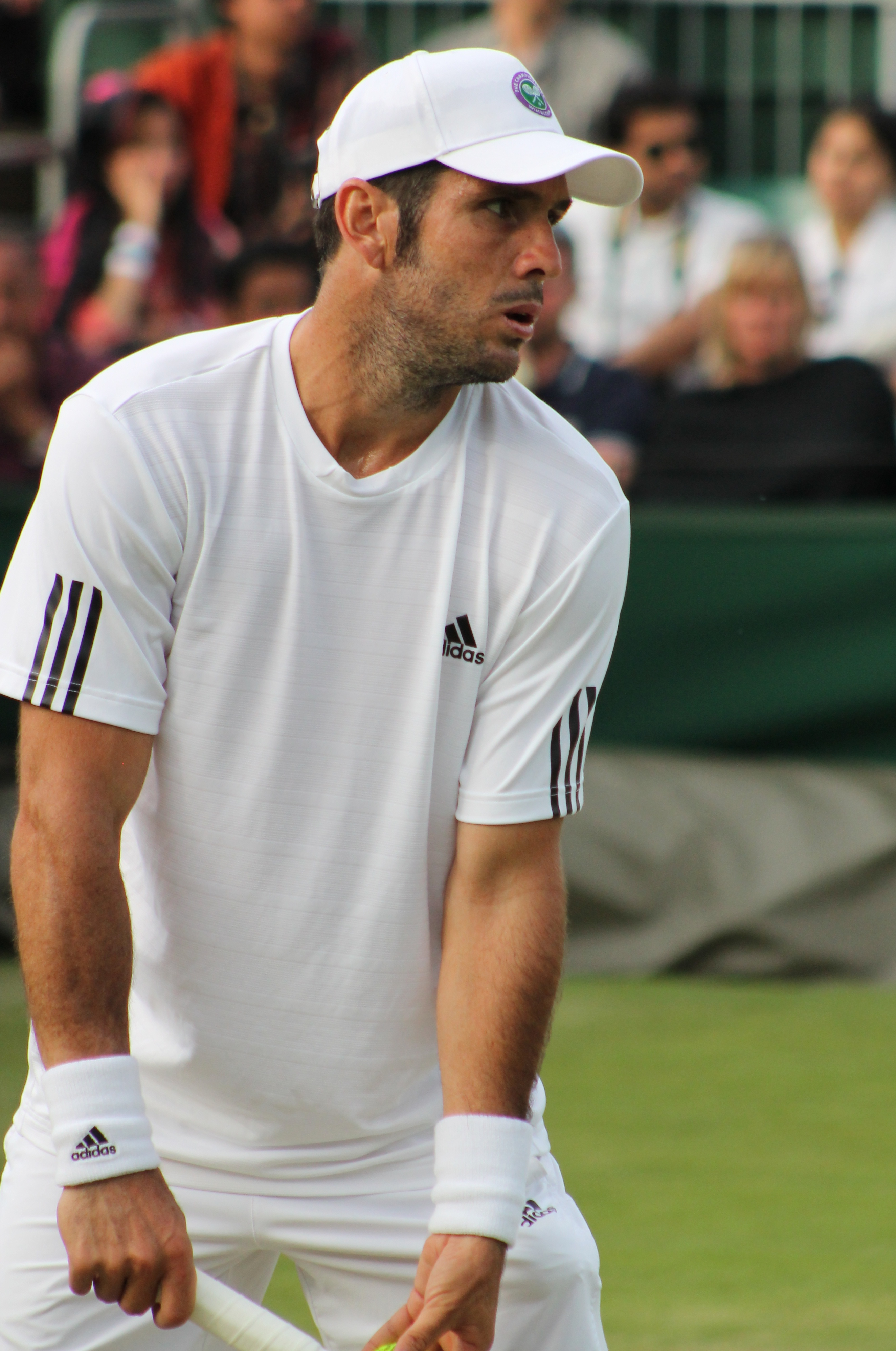 Marrero WM13-003